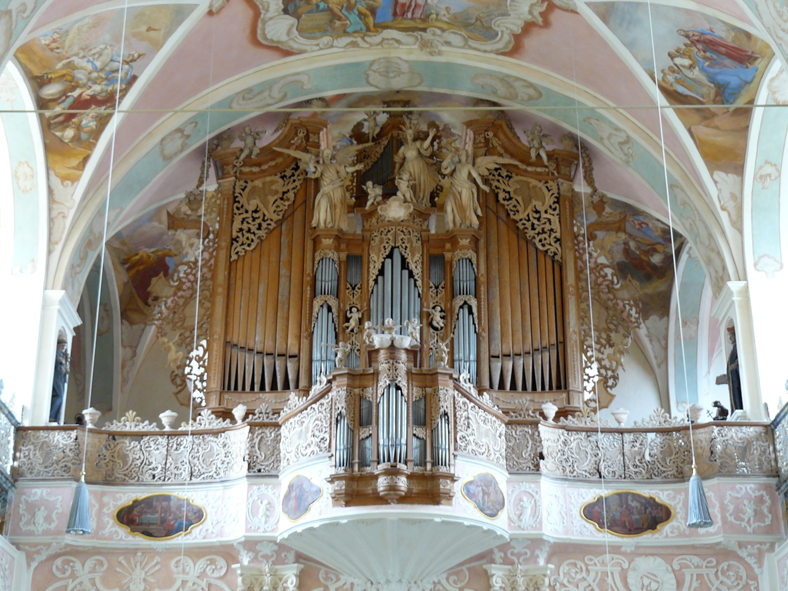 Orgel der Maihinger Kirche